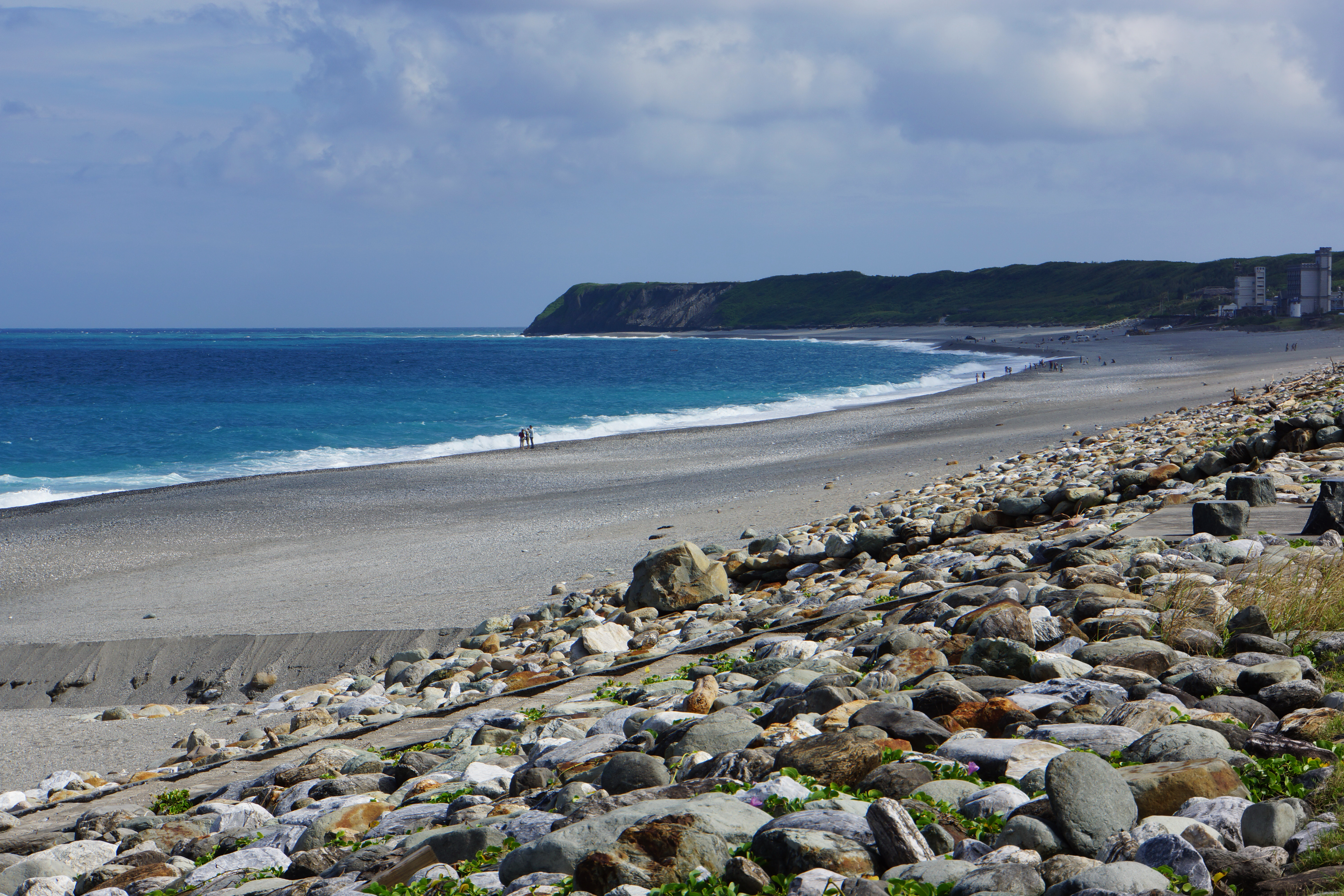 奇萊鼻 Qilai Cape